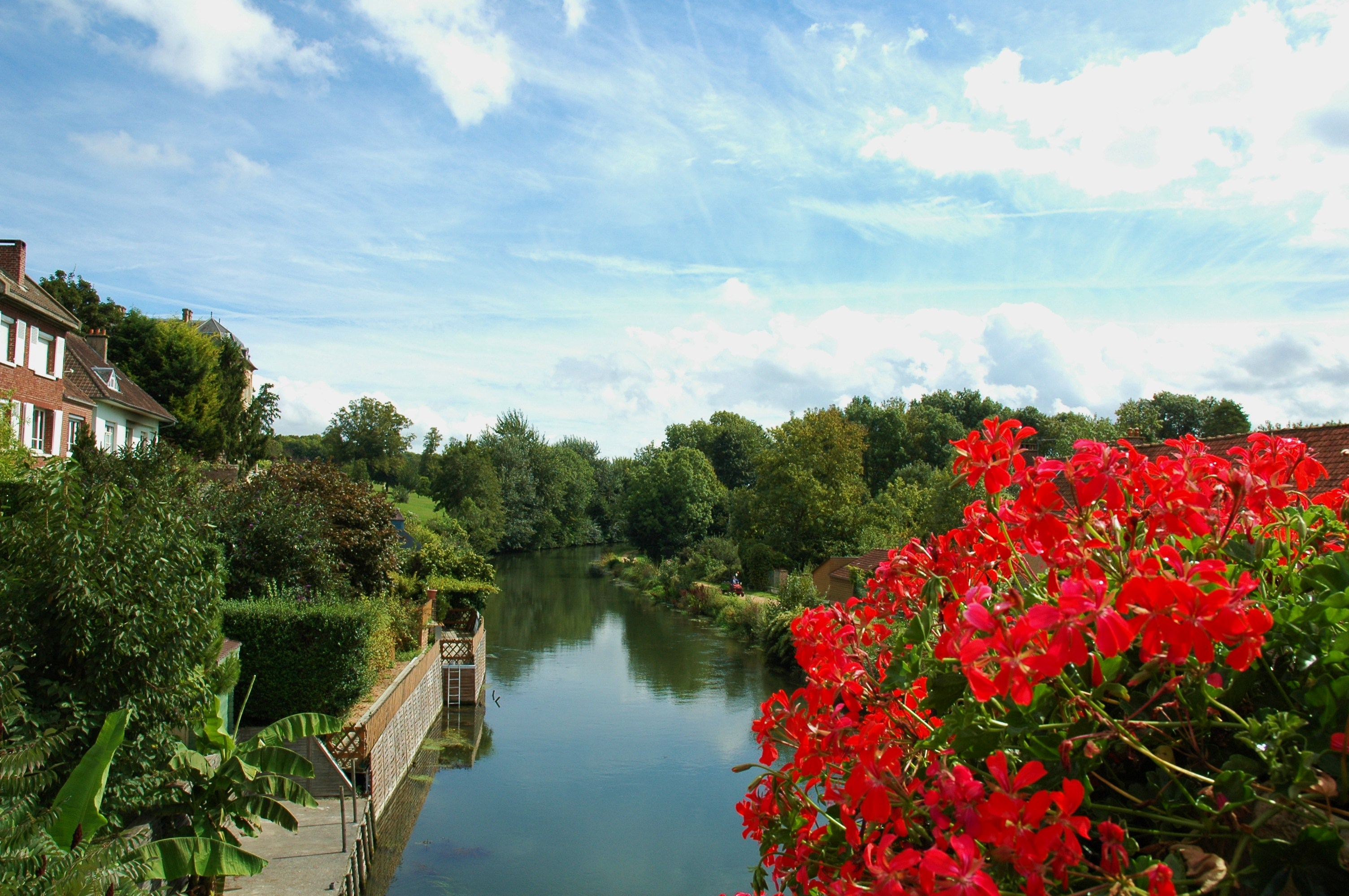 La Somme à Long (département de la Somme)